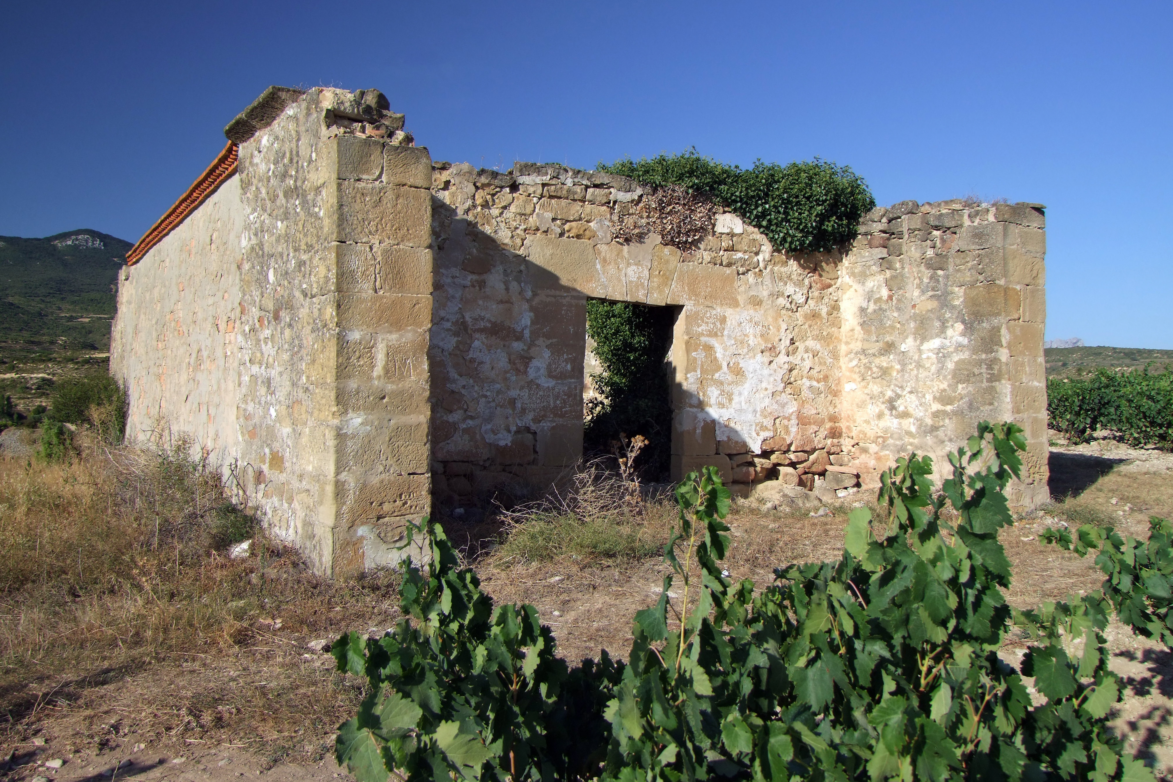 Ermita de San Bartolomé en la localidad de Ábalos, La Rioja - España